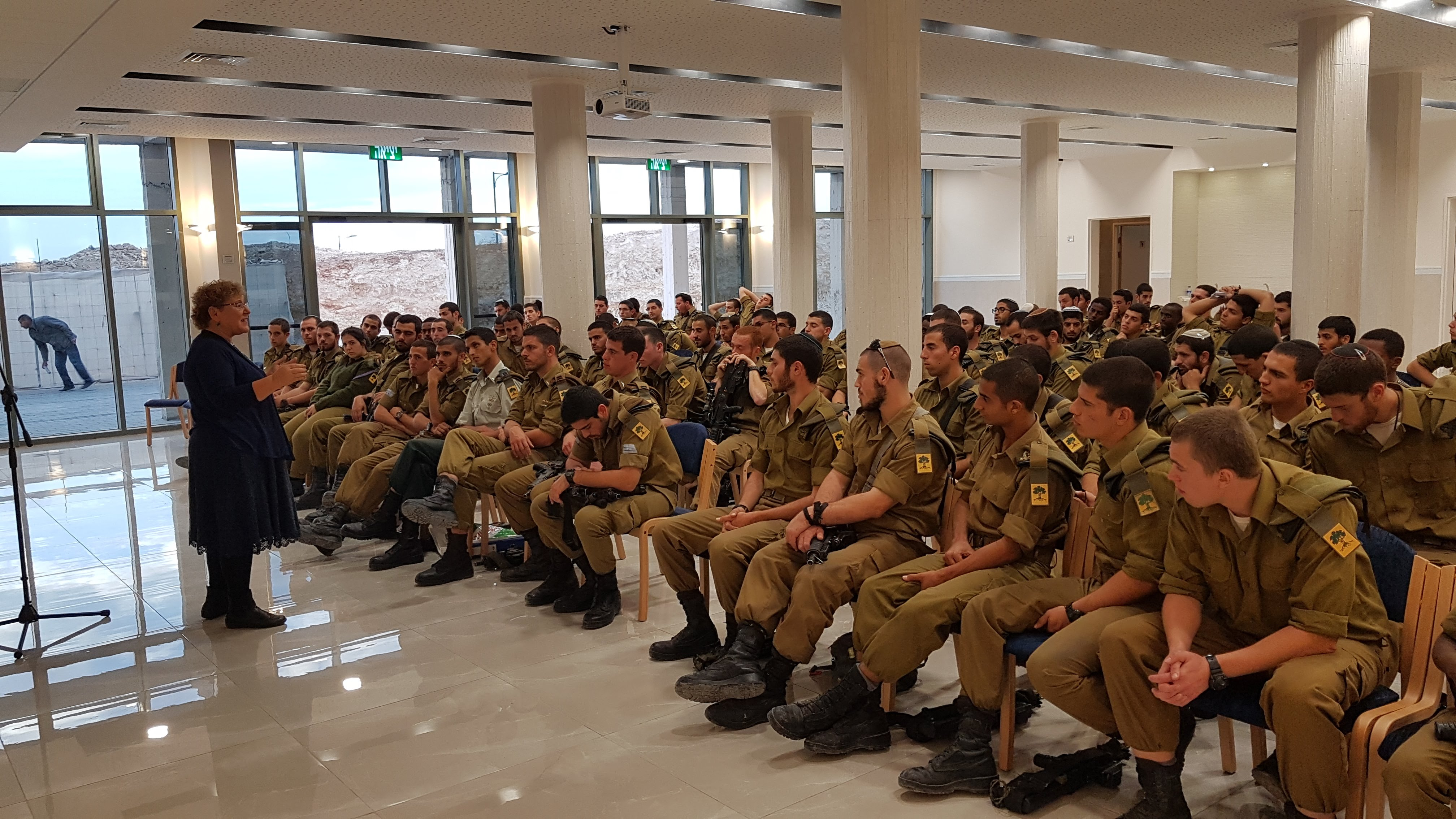 בהרצאה בפני חיילים באולם שבת אחים שנבנה לזכרם של אוריאל ואלירז בישוב גבעת זאב